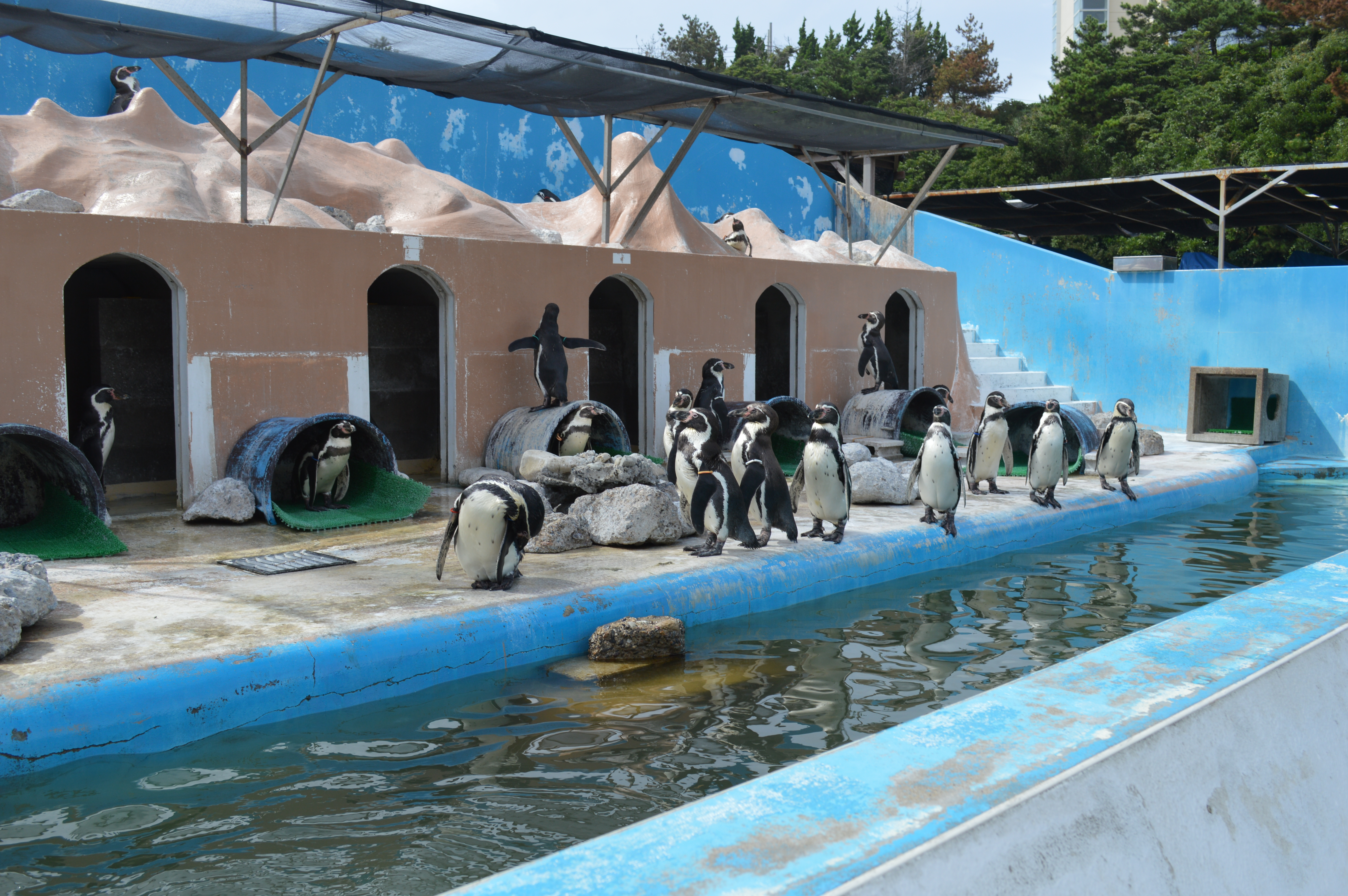 千葉県銚子市にある犬吠埼マリンパーク、フンボルトペンギン